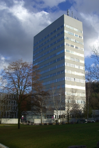 Physiktower